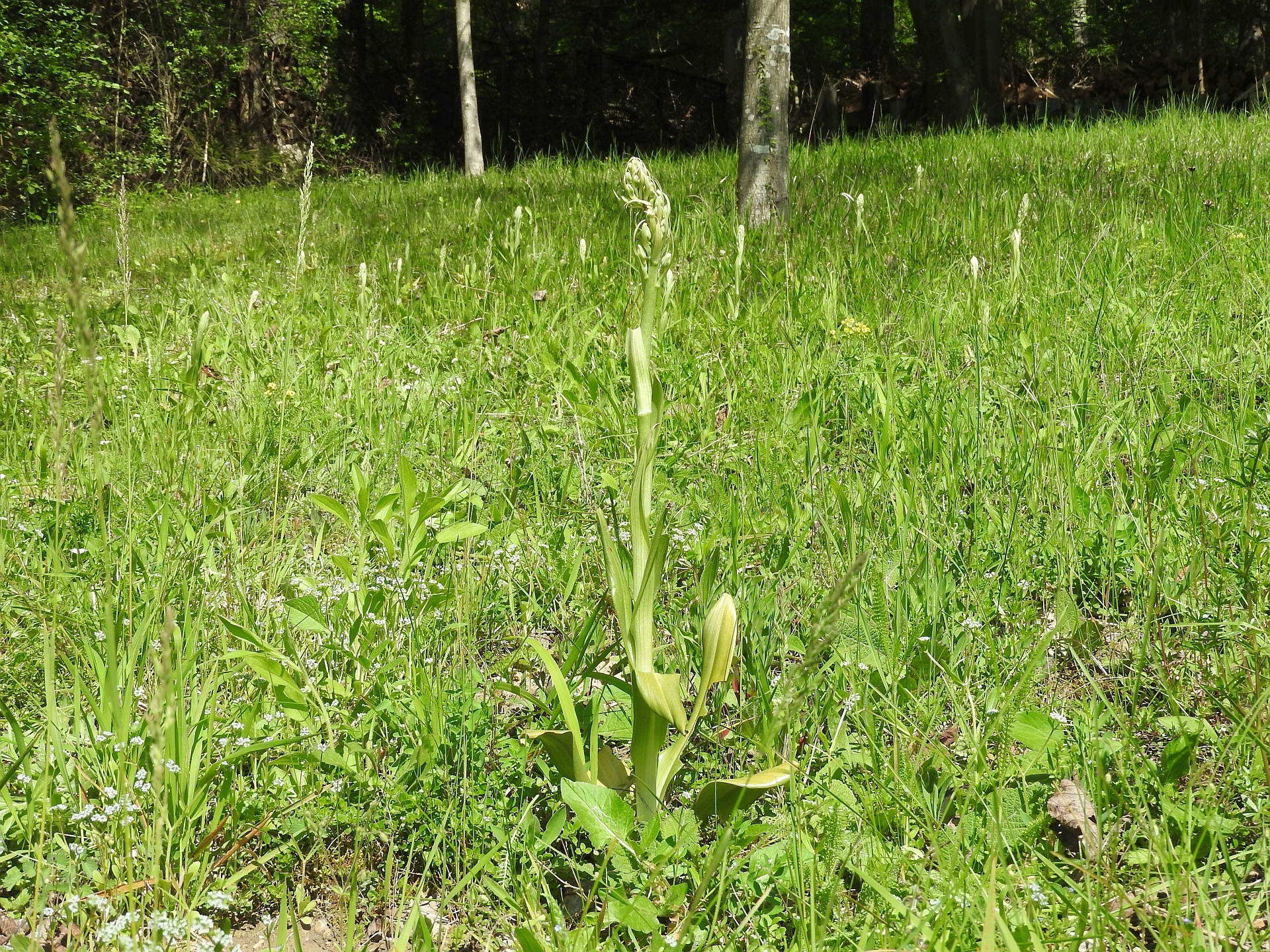 Bocksriemenzunge (Himantoglossum hircinum), Weingarten (Baden), Ungeheuerklamm, 05.05.2016